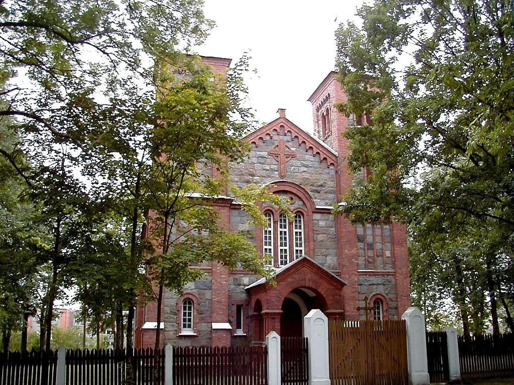 Atašienes baznīca 2000-07-28